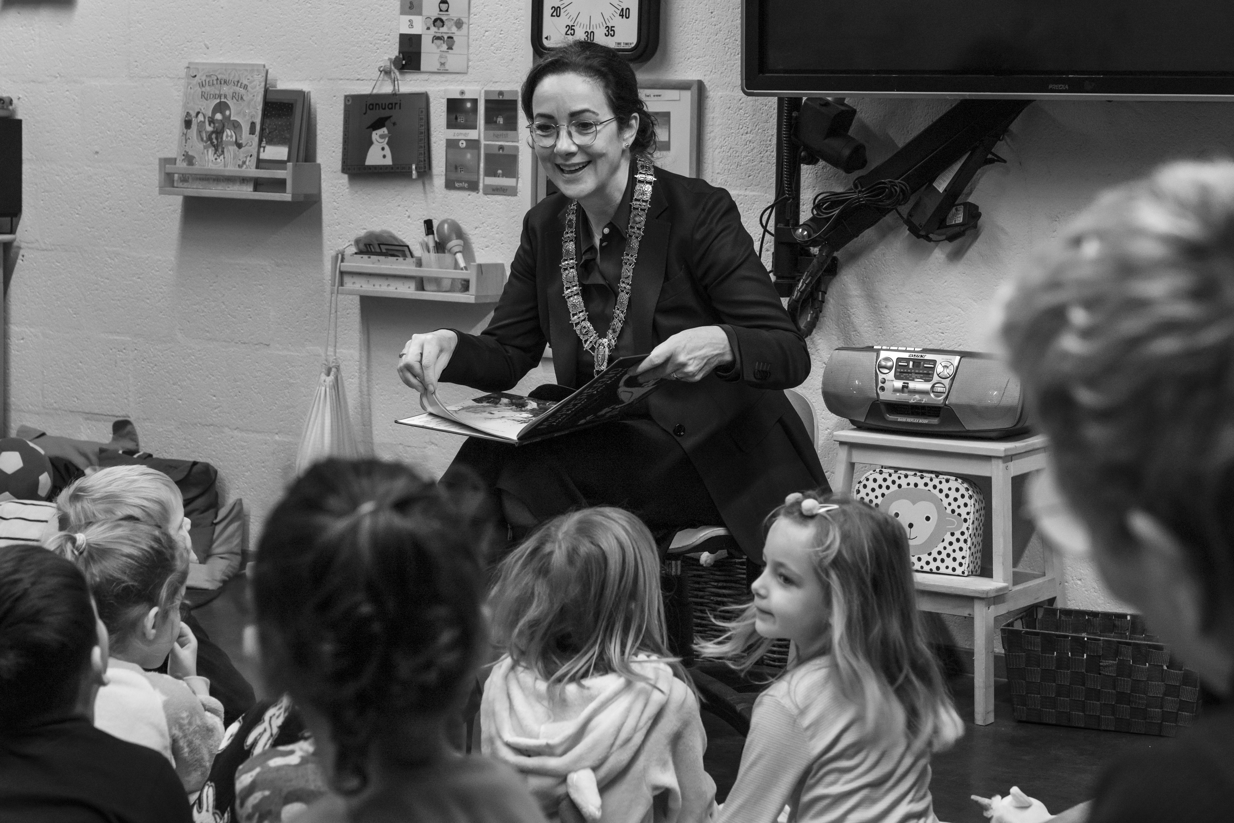 Burgemeester Femke Halsema leest uit het boek "Moppereend" voor aan een groep kinderen op een Amsterdamse basisschool in het kader van de nationale voorleesweken 2020